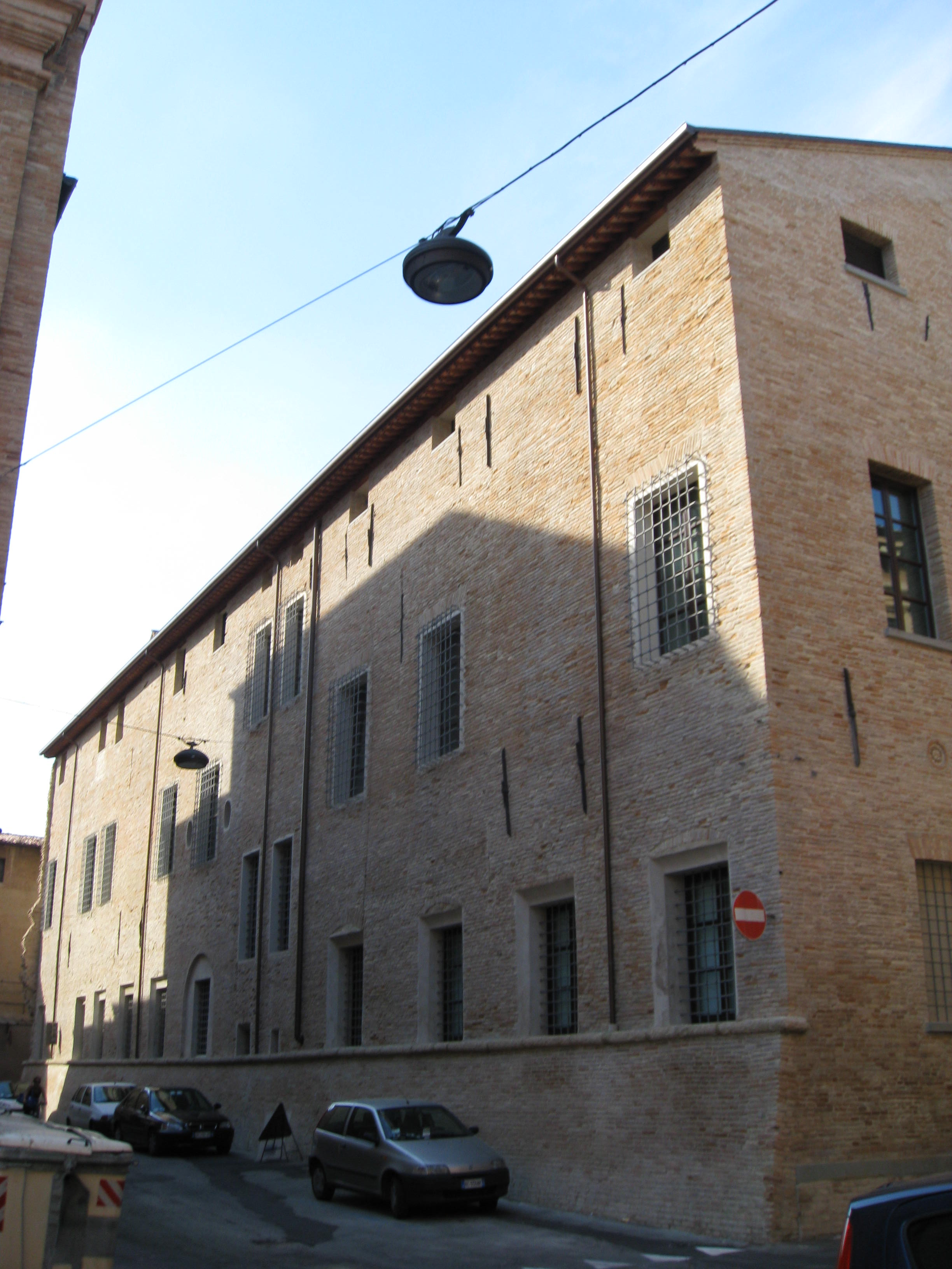 Perkele, facciata posteriore del Monte di Pietà di Forlì